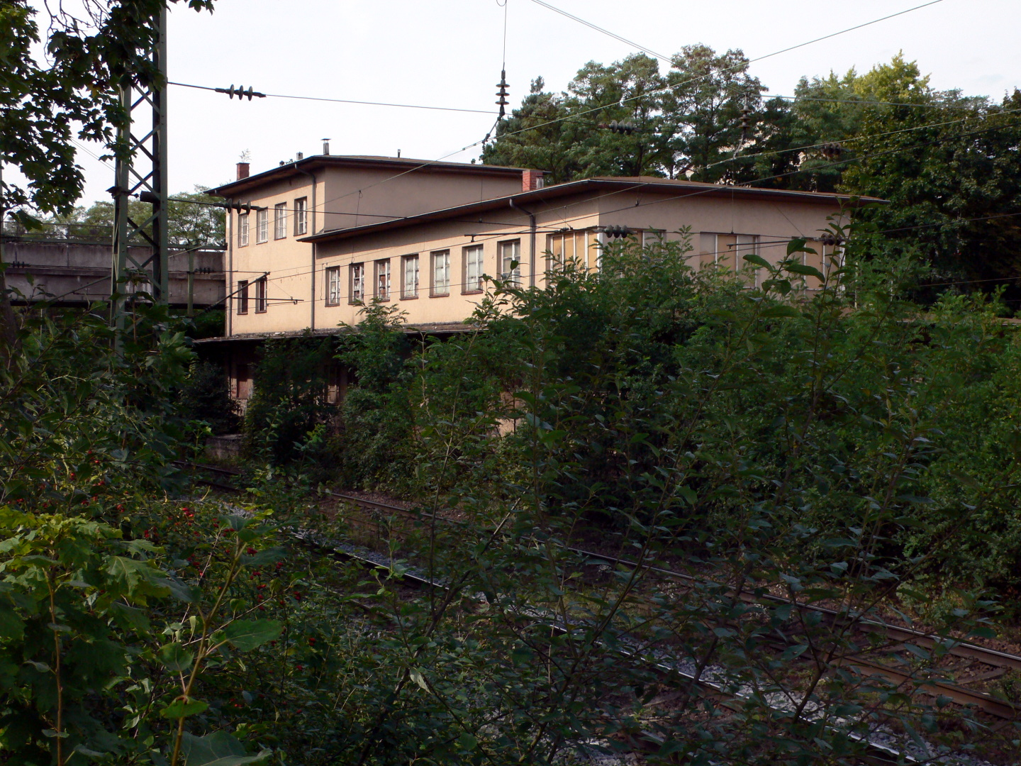 Haltepunkt Nürnberg-Zollhaus, Blick von Süden auf das ehemalige Empfangsgebäude (aufgelassen am 31. Mai 1992); auf dem abgebrochenen Bahnsteig hat sich Vegetation breit gemacht